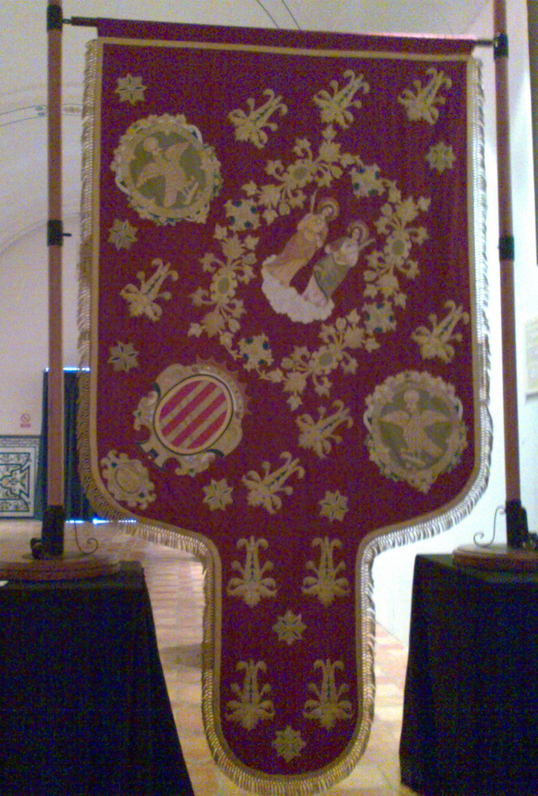 Gloriosa ensenya de l'Oriol (fes o envers), bandera/senyera d'Oriola.